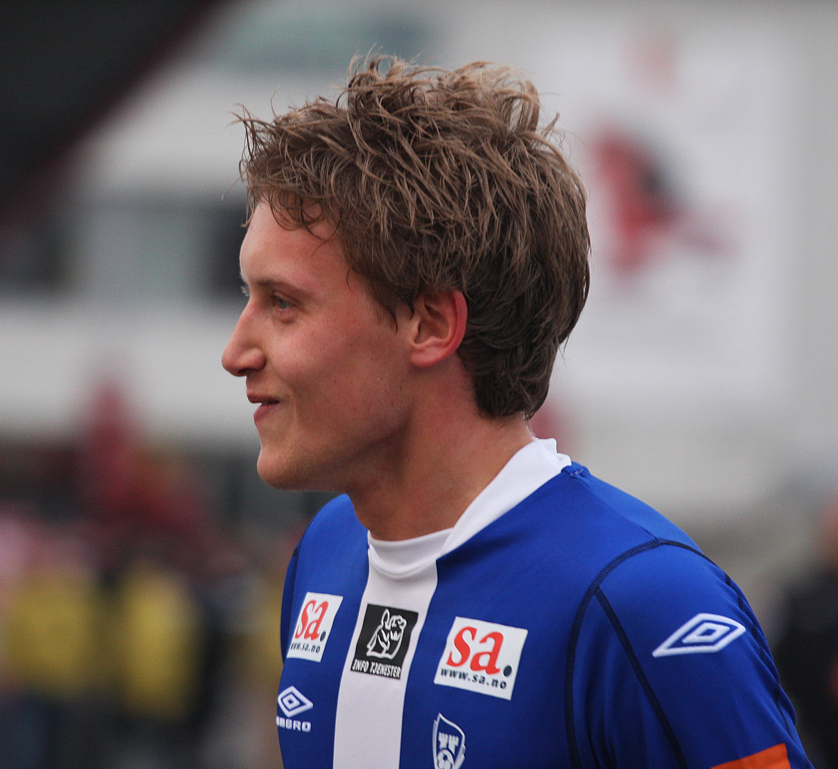 Ole Christoffer Heieren Hansen, Sarpsborg